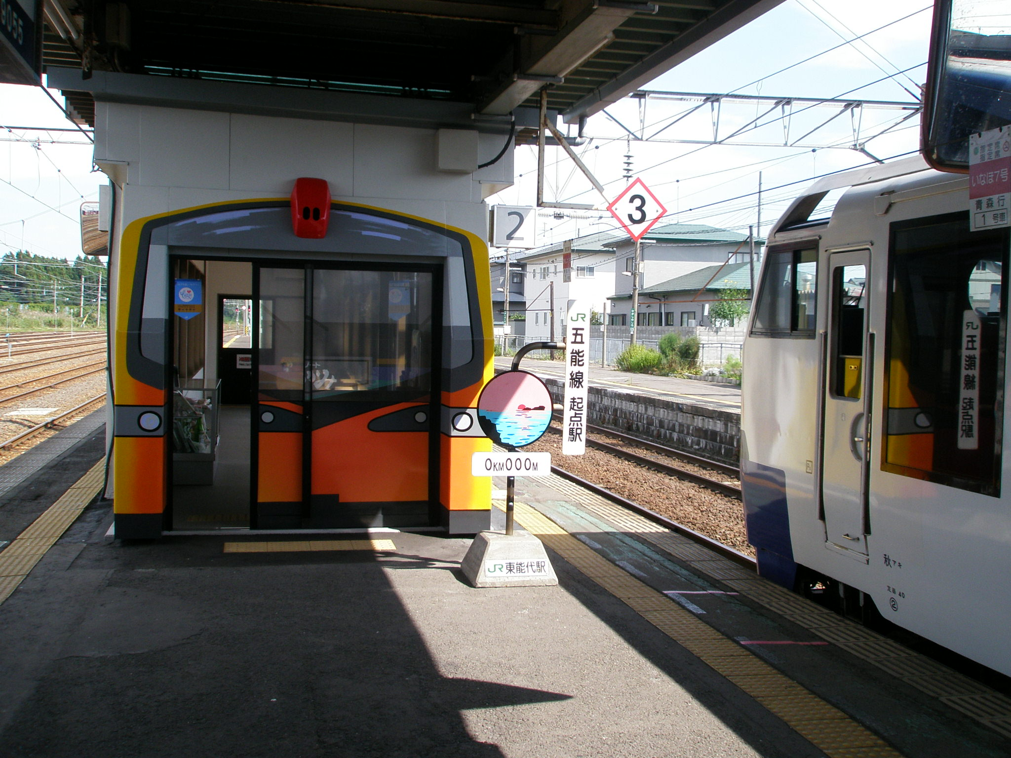 リゾートしらかみくまげら編成を模した奥羽本線／五能線東能代駅ホームの待合室です。